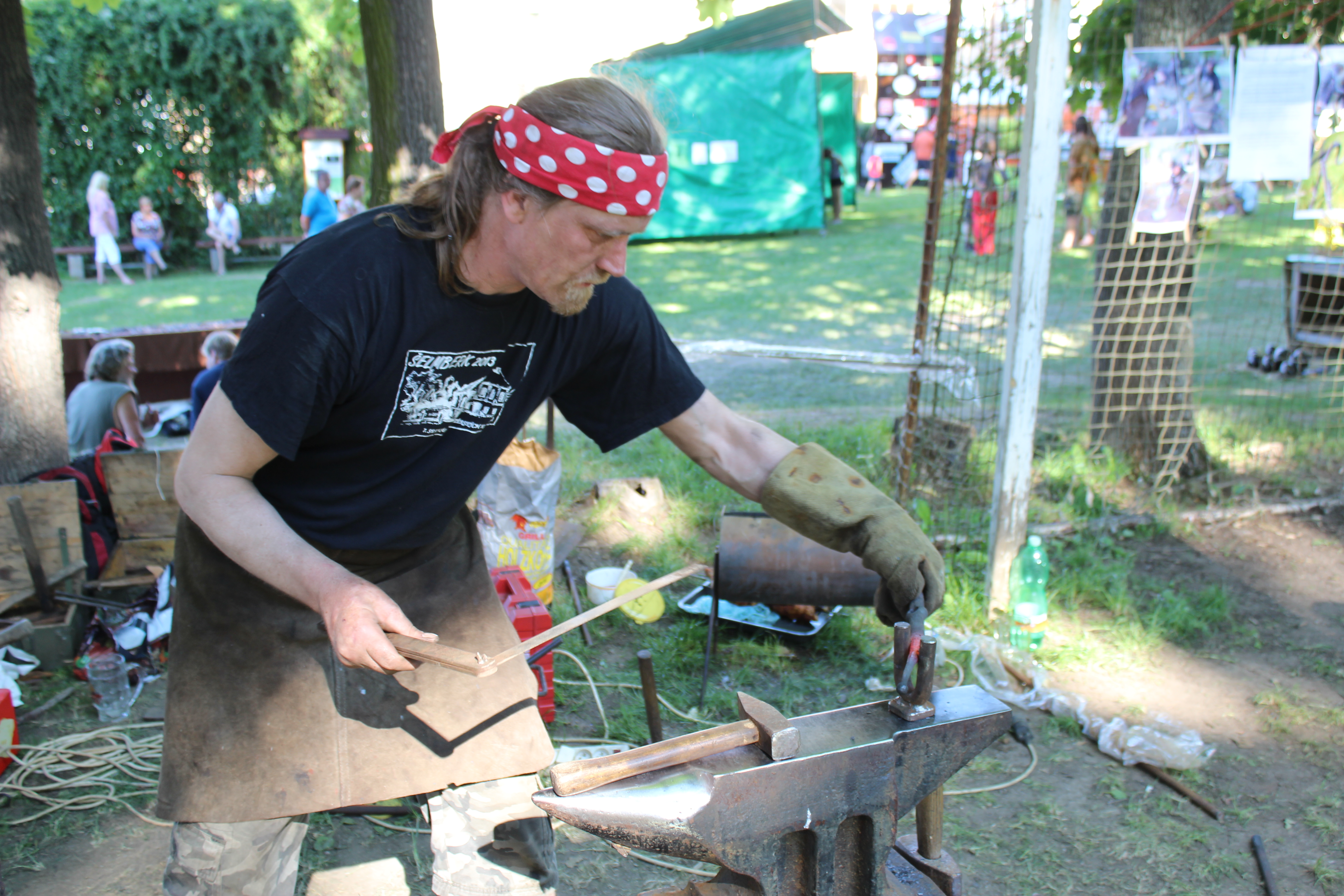 V Litni (okres Beroun) se o víkendu 7. a 8. 6. 2014 konalo 1. setkání kovářů, podkovářů, dráteníků, klempířů a všech, kteří pracují s kovem s názvem „Kováři v Litni“. Příští „Kováři v Litni“ se konají 6. – 7. 6. 2015 opět v Areálu Liteň a budou spojeni se setkáním absolventů škol, které zde působily: Středního odborného učiliště a Učňovské školy zemědělské, obor kovář – podkovář. Pořadateli jsou Atelier Svatopluk, o.p.s. Liteň a Kovárna pro radost v Kytíně.